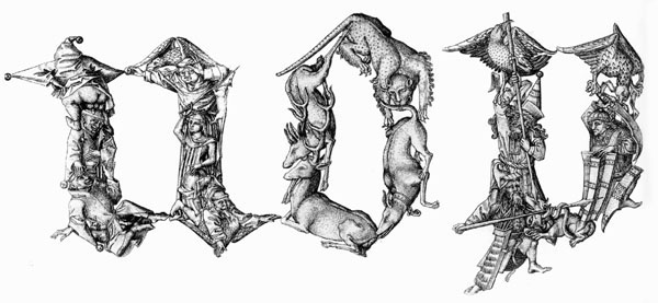 N, O and P, L.295, L.296, L.297